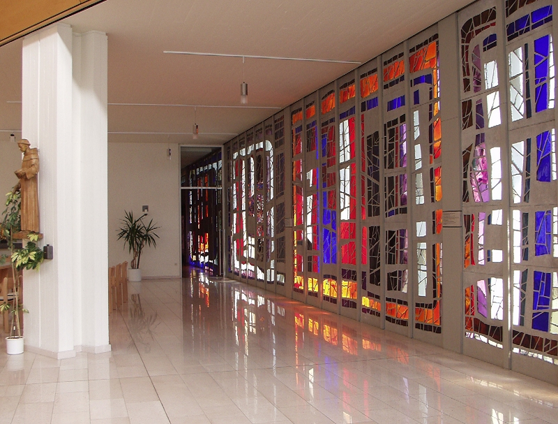 Glasfenster nach einem Entwurf von Lydia Roppolt an der Südseite der Autobahnkirche Haid